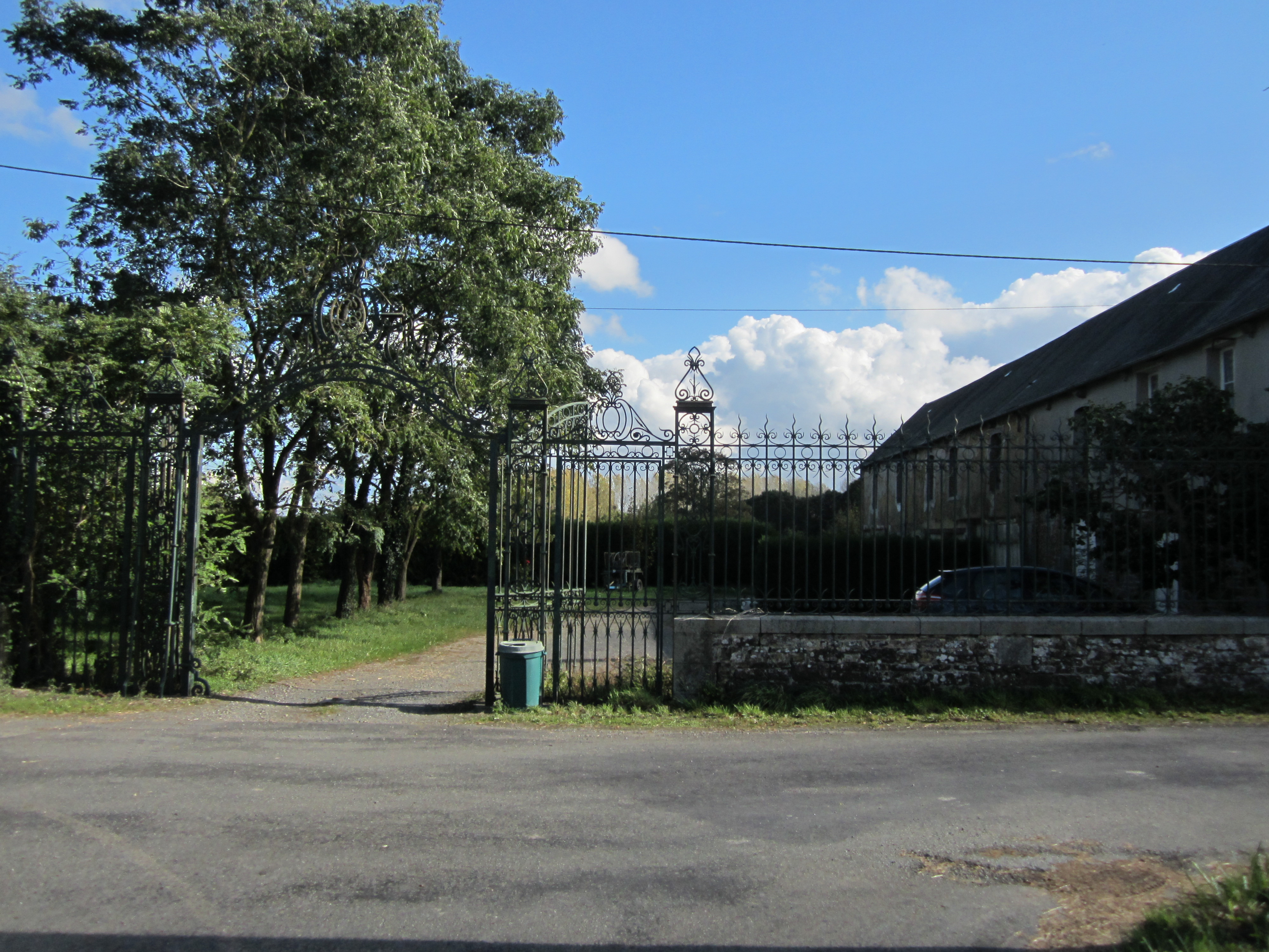 château de Bourey, détruit vers 1980